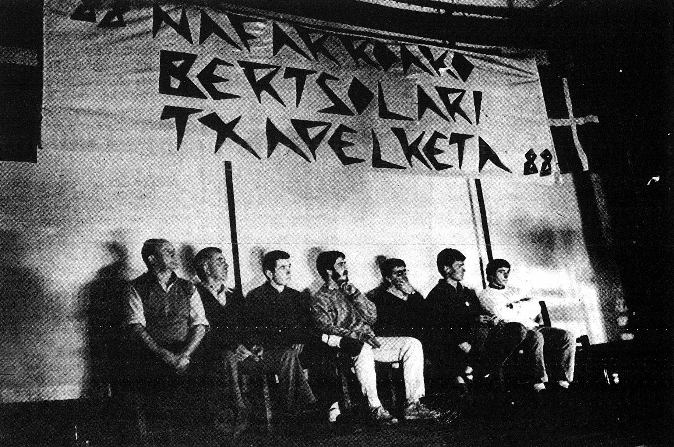 Goizuetako kanporaketa